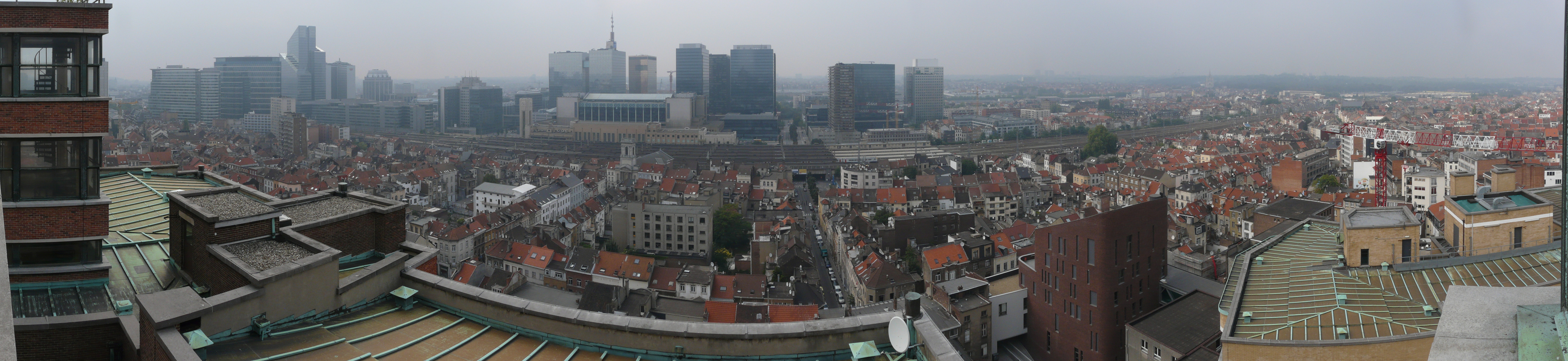 Vue panoramique du Quartier Nord de Bruxelles, incluant le Centre de Communication Nord, le bas de Schaerbeek entre la gare du Nord et la rue des Palais, pris depuis les toits du mVillage (ex Hôtel RTT), immeuble art-déco créé par l’architecte Michel Polak.